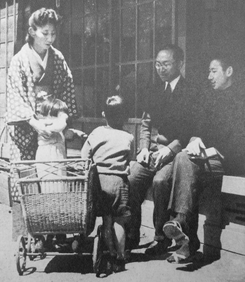 岩倉具栄と家族